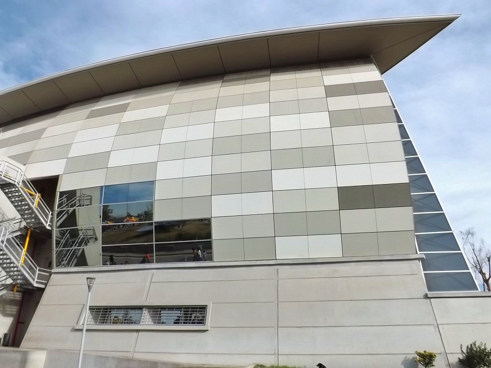 Espacio Julio Le Parc, en Guaymallén (Mendoza, Argentina).